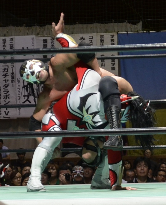 mannjigatame